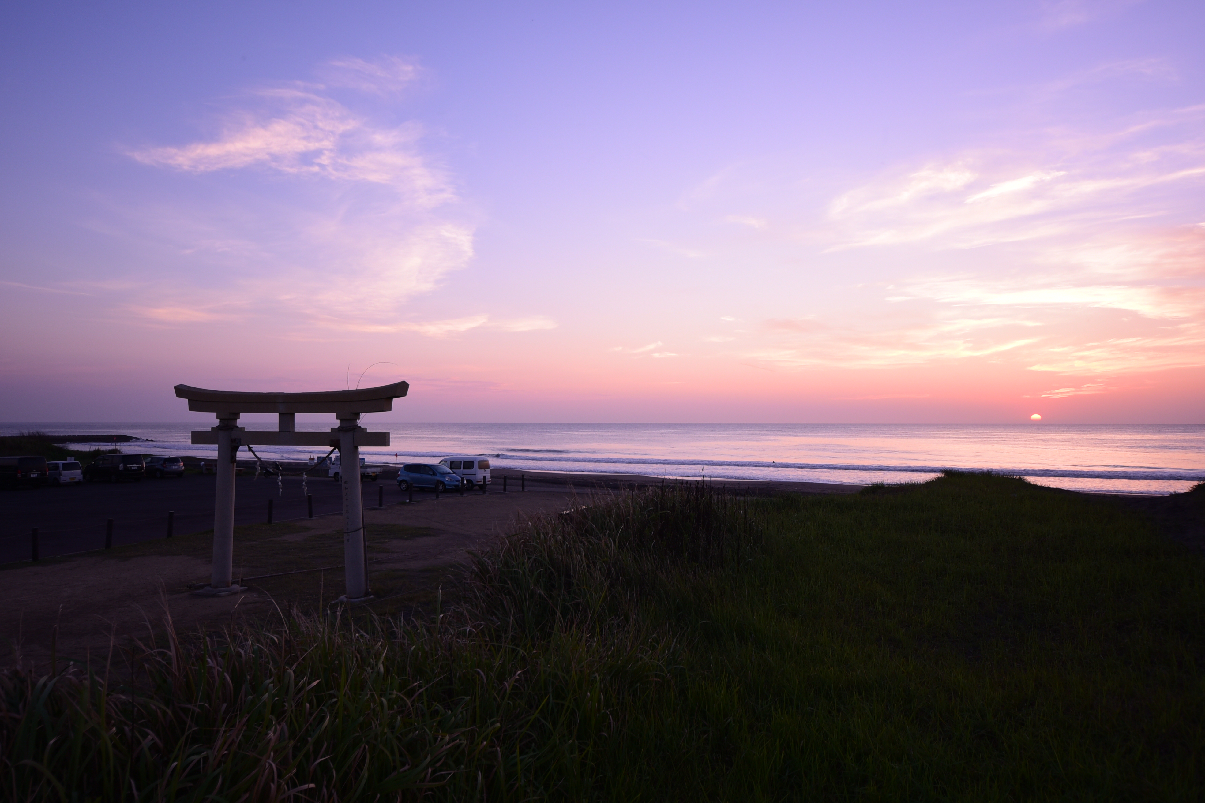 釣ヶ崎海岸の東浪見の鳥居 2018年8月31日撮影